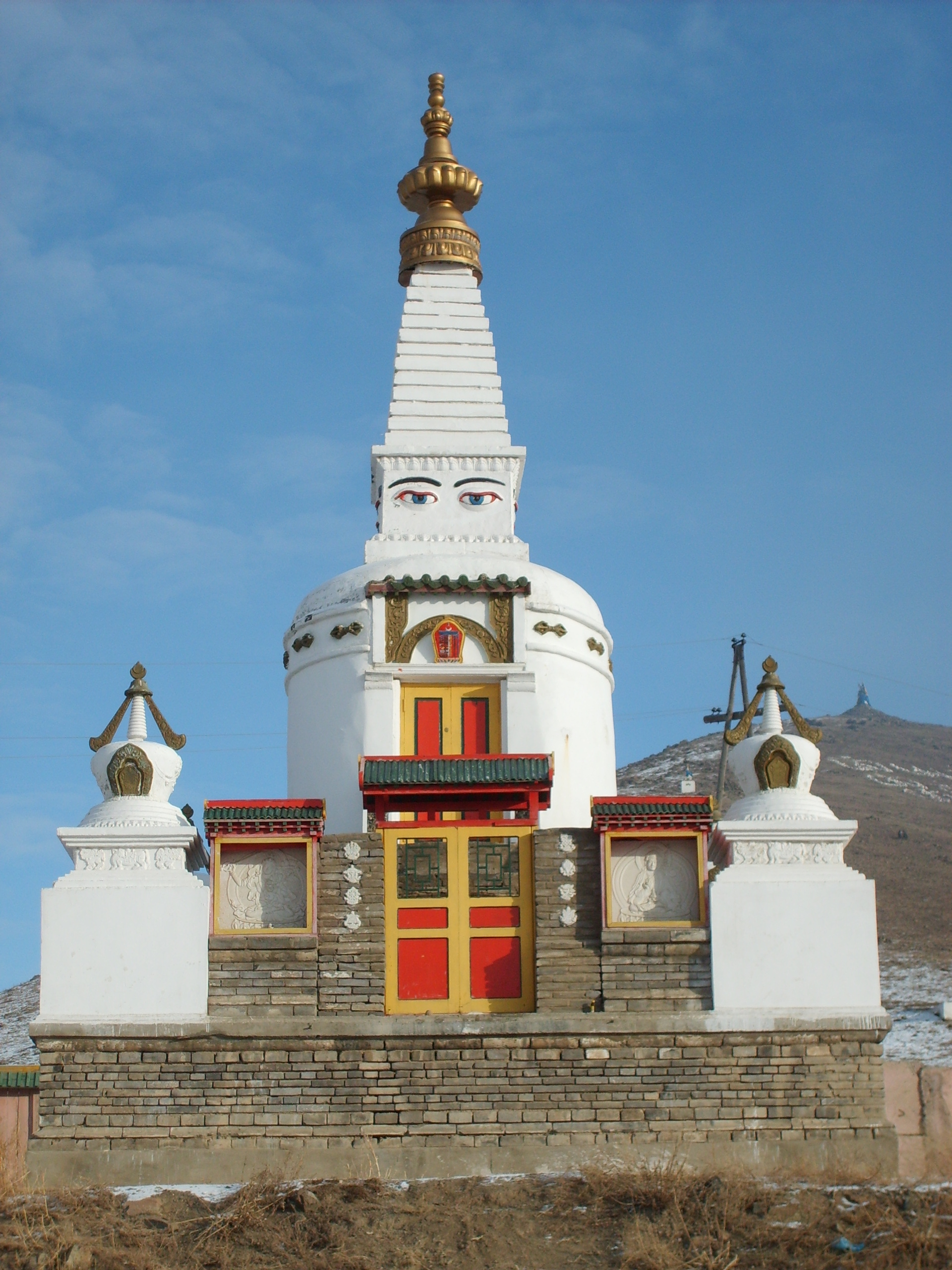 Stupa of Dambadarjaalin Monastery in Ulan Bator.